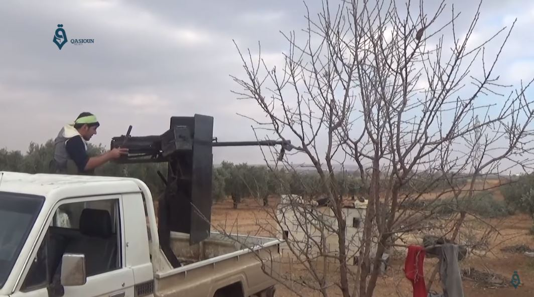 Bataille d'al-Bab 14 décembre 2016